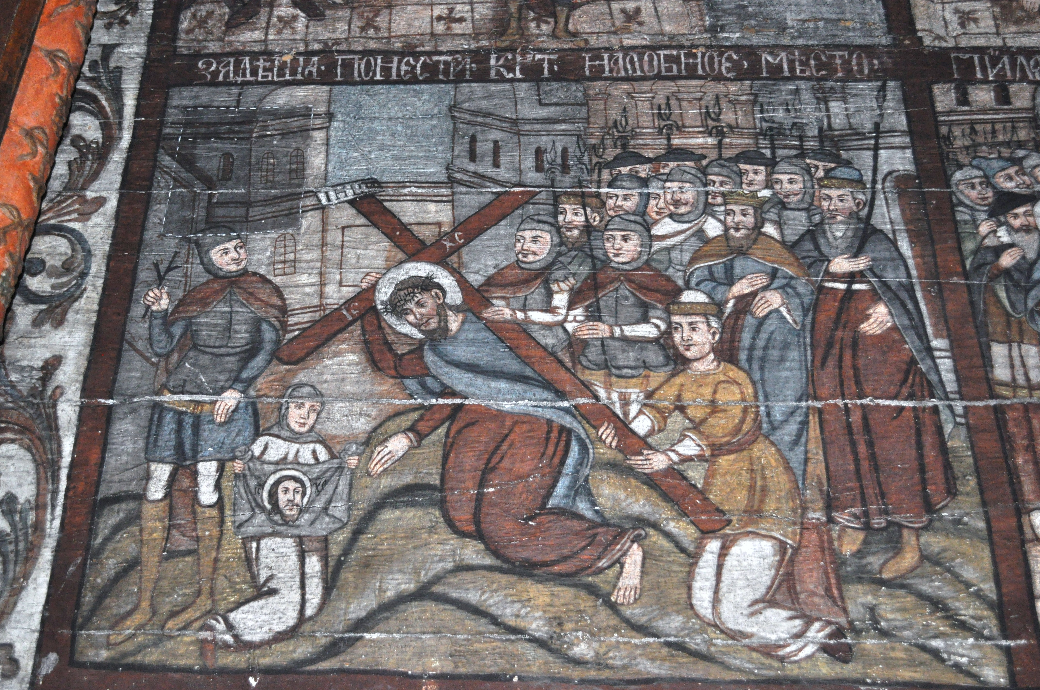 Biserica de lemn "Sfântul Nicolae", sat BOGDAN VODĂ